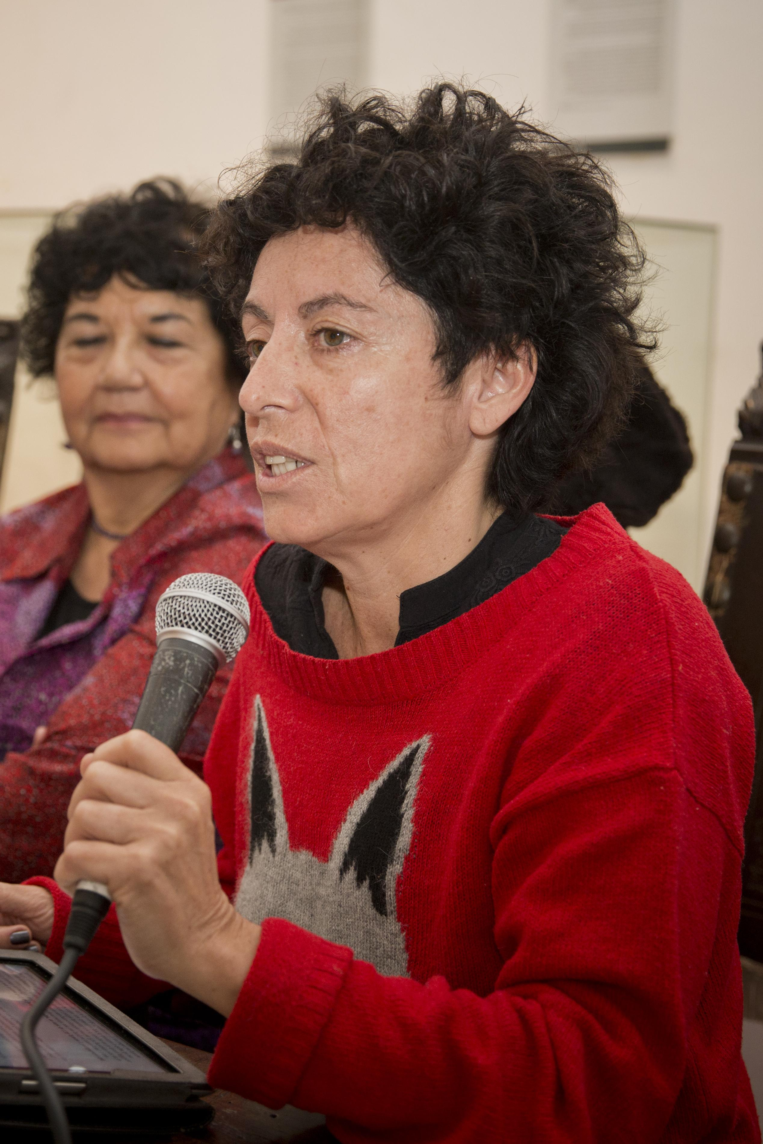 Marta Dillon en Cabildos Abiertos (Buenos Aires, 30 de julio de 2015). El Ministerio de Cultura de la Nación, presentó, en el Museo Histórico Nacional del Cabildo y de la Revolución de Mayo, la tercera edición de “Cabildo Abierto”, con la presencia de la subsecretaria de la Unidad de Coordinación Nacional para la Prevención, Asistencia y Erradicación de la Violencia Contra las Mujeres, Victoria Montenegro; la socióloga y doctora en Historia, declarada Ciudadana Ilustre de la Ciudad de Buenos Aires por su trayectoria académica y como feminista, Dora Barrancos; la jefa de Gabinete de Asesores del Ministerio de Desarrollo Social, María Cecilia Velázquez; la periodista y activista, referente del colectivo “Ni Una Menos”, Marta Dillon; y, como moderador, el director del Museo Histórico Nacional del Cabildo y de la Revolución de Mayo, Gabriel Di Meglio.